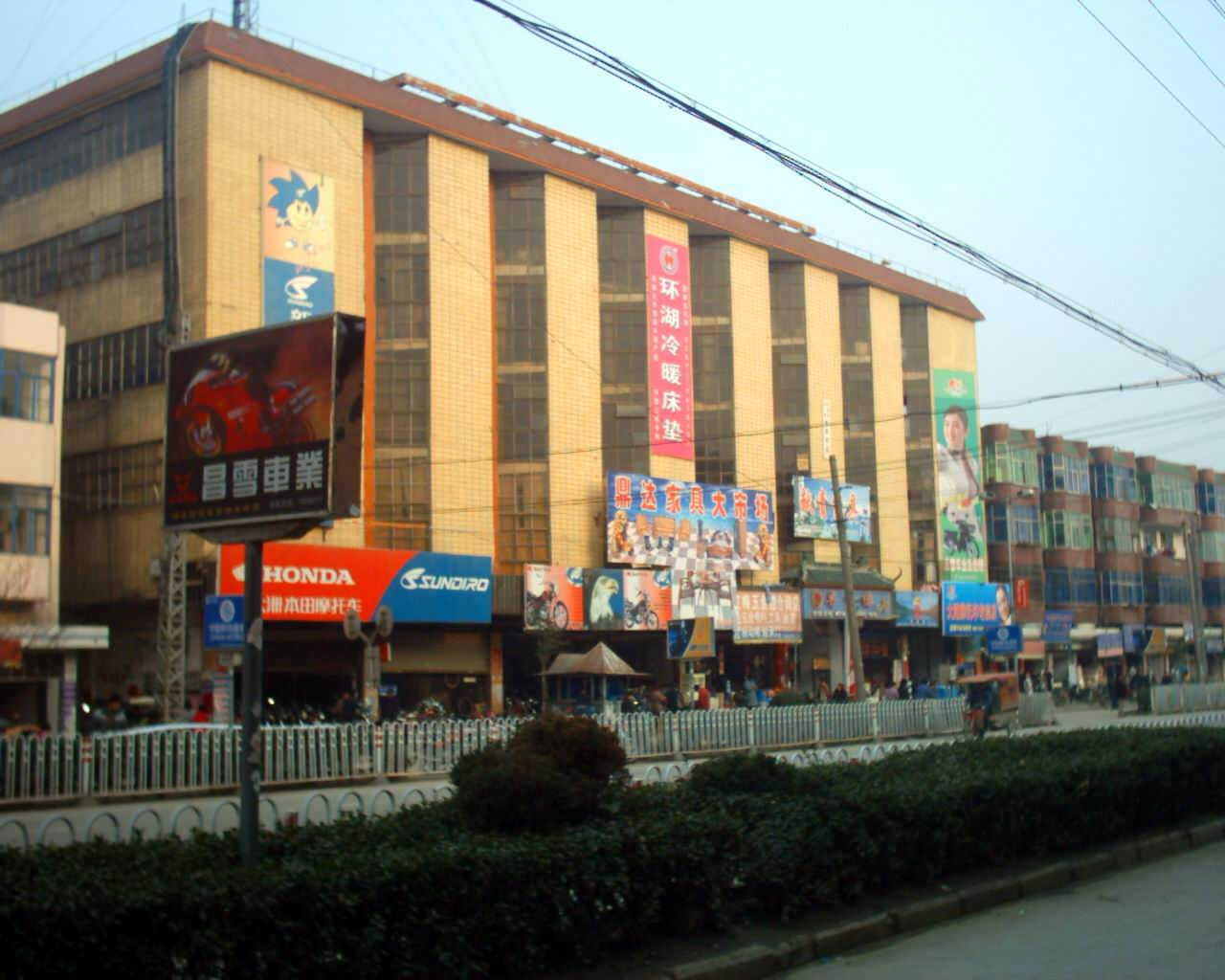 泗县街道